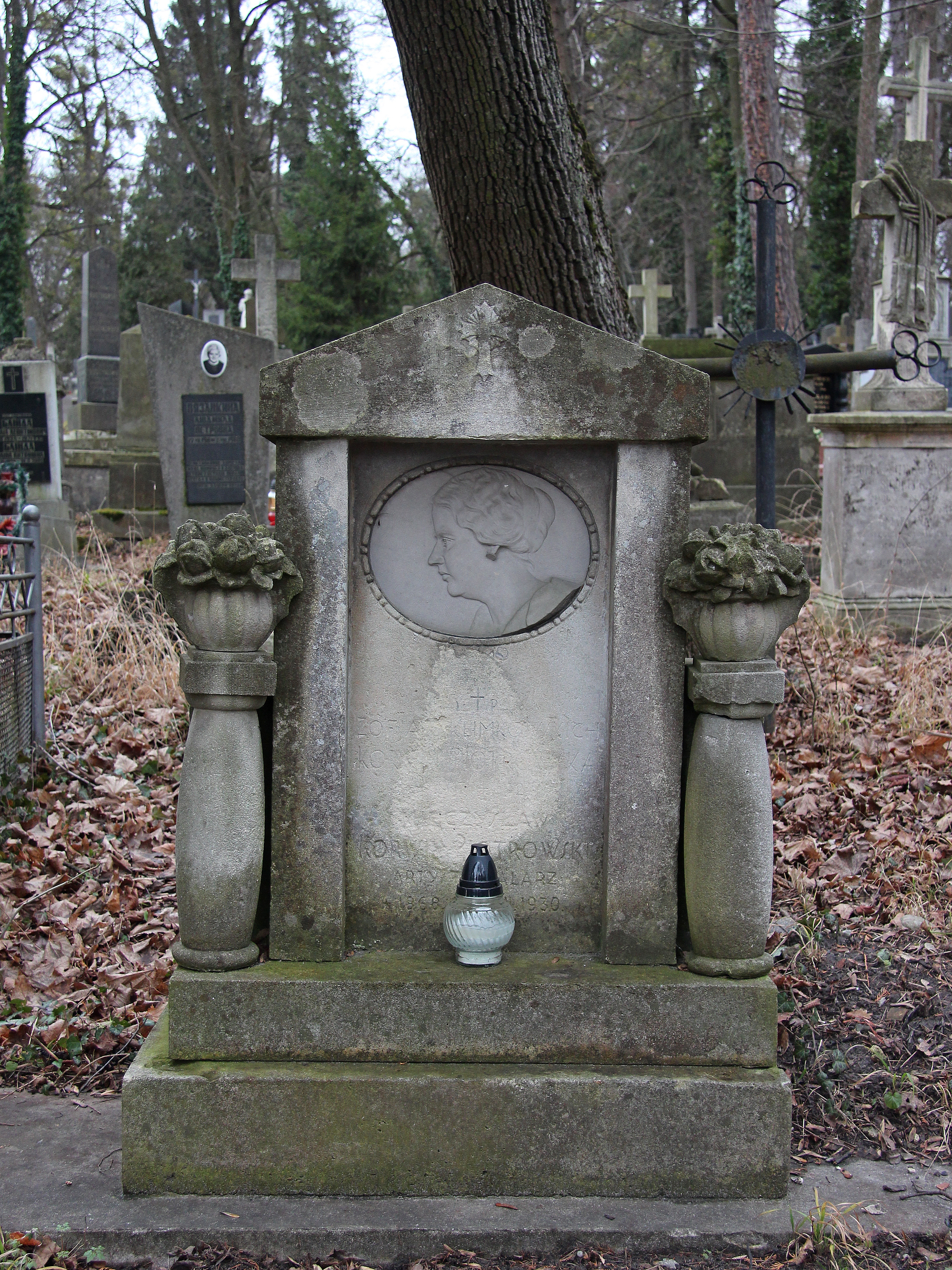 Пам'ятник на могилі С. та М. Корвін Піотровських.Личаківський цвинтар , поле № 2.